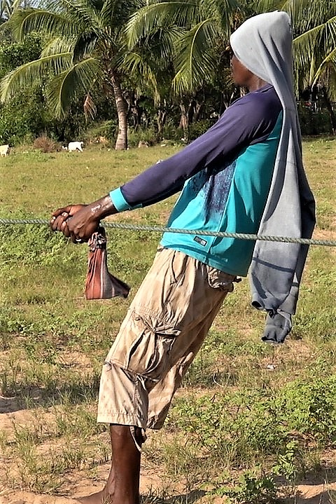 Henkilö vetää nuotan köyttä, vetäminen tapahtuu vartaloa painamalla, pää suojattu, Villa Karon ranta